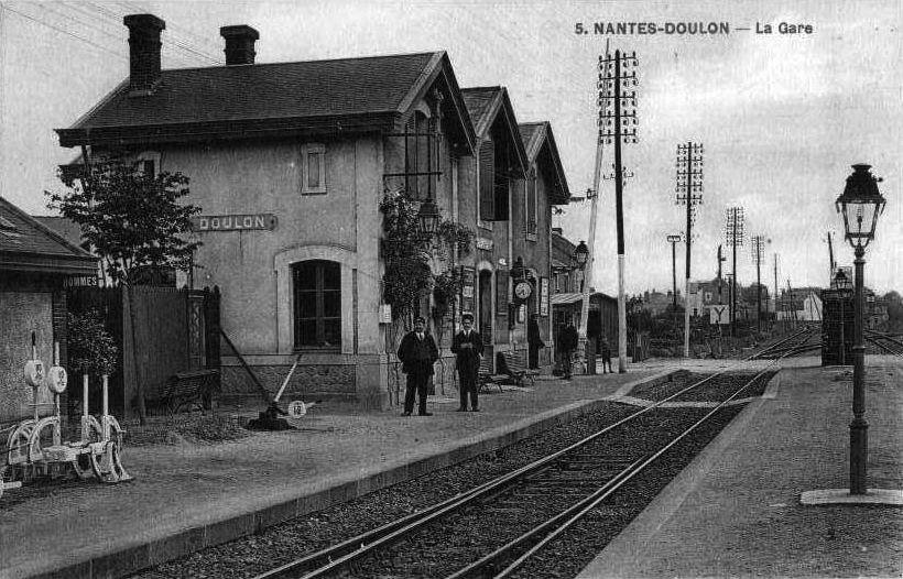 La gare de Doulon avec ses trois bâtiments identiques accolés, vers 1910